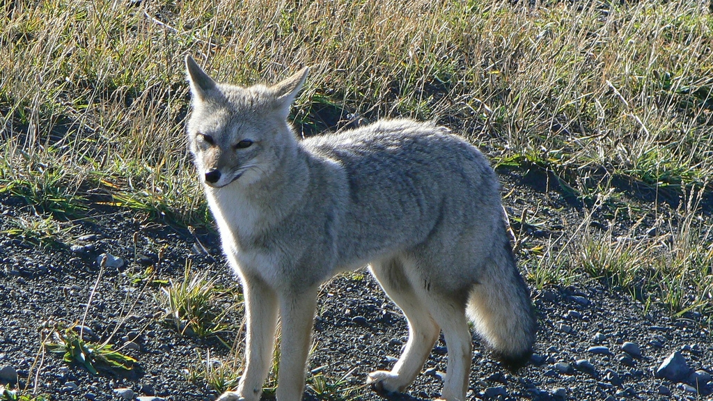 Zorro en las Torres del Paine